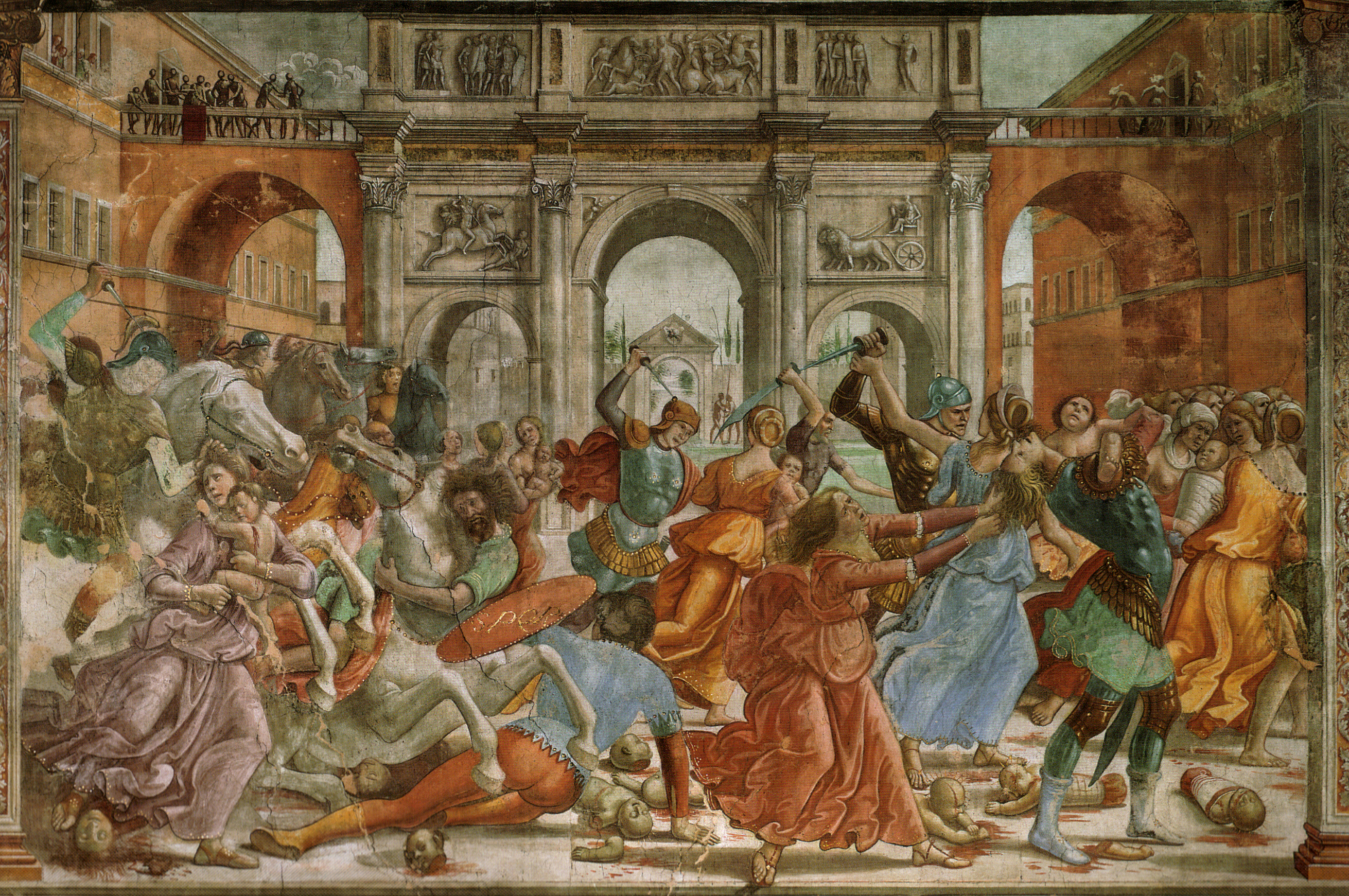 cappella tornabuoni frescoes in florence